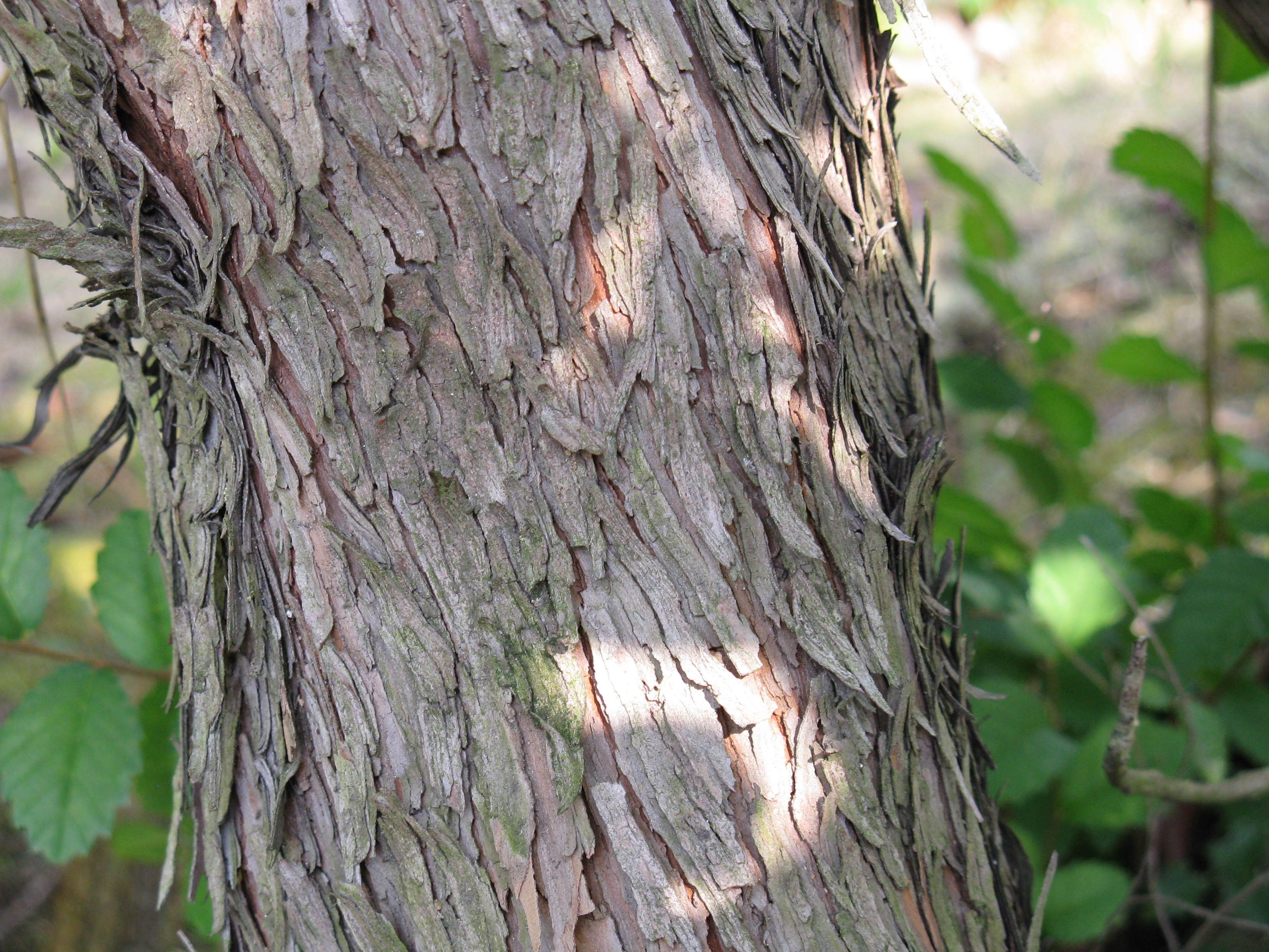 Arbutus unedo